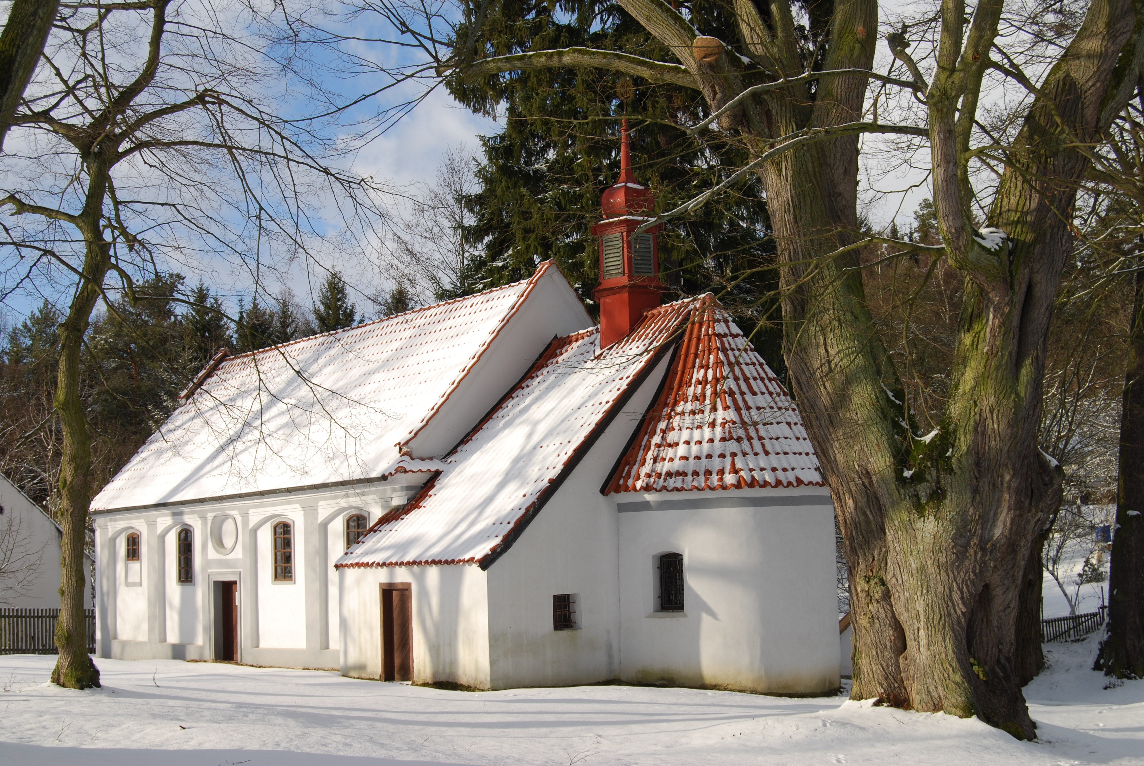 Poutní místo kostel sv. Rosalie. Borovany (Bernartice). Okres Písek. Česká republika.